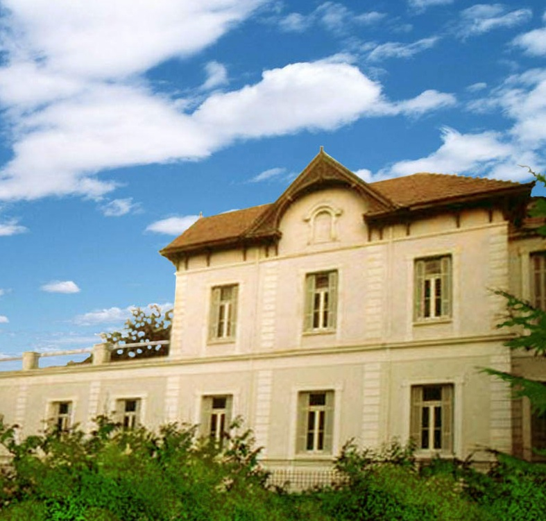 Μουσείο Φυσικής Ιστορίας "Γουλανδρή"